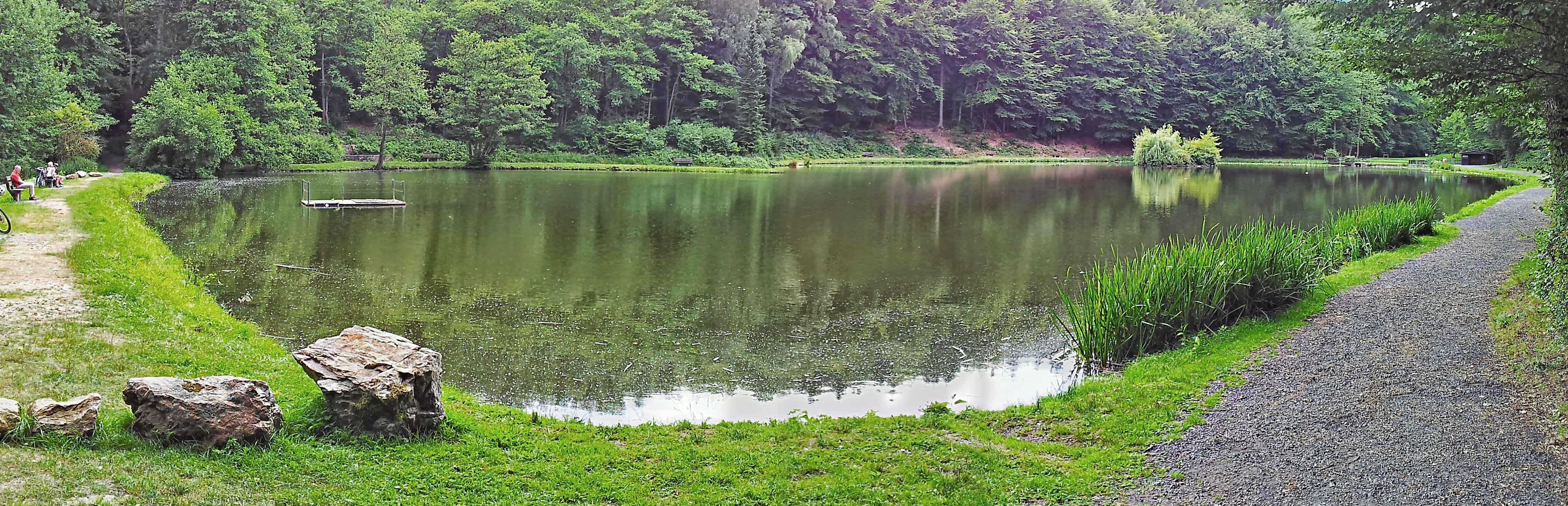 Der See im Naturschutzgebiet Theißtal bei Niedernhausen. Das Theißtal ist eines von sieben Naturschutzgebieten der Stadt Wiesbaden.